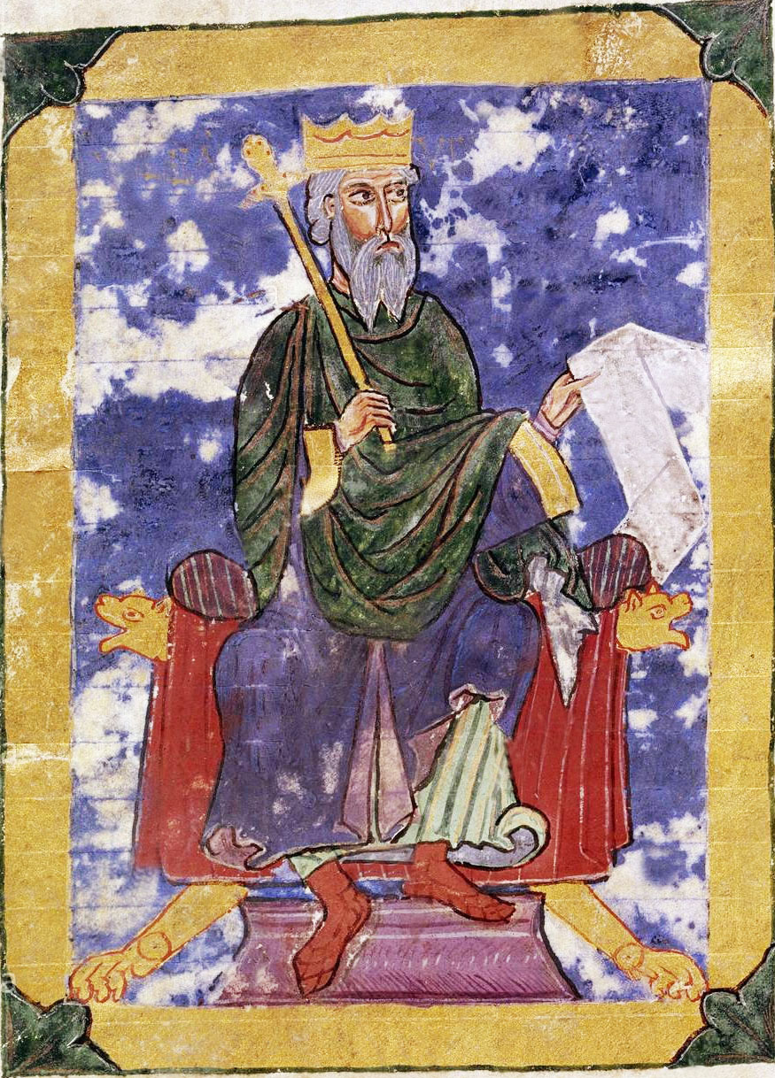 Bermudo II